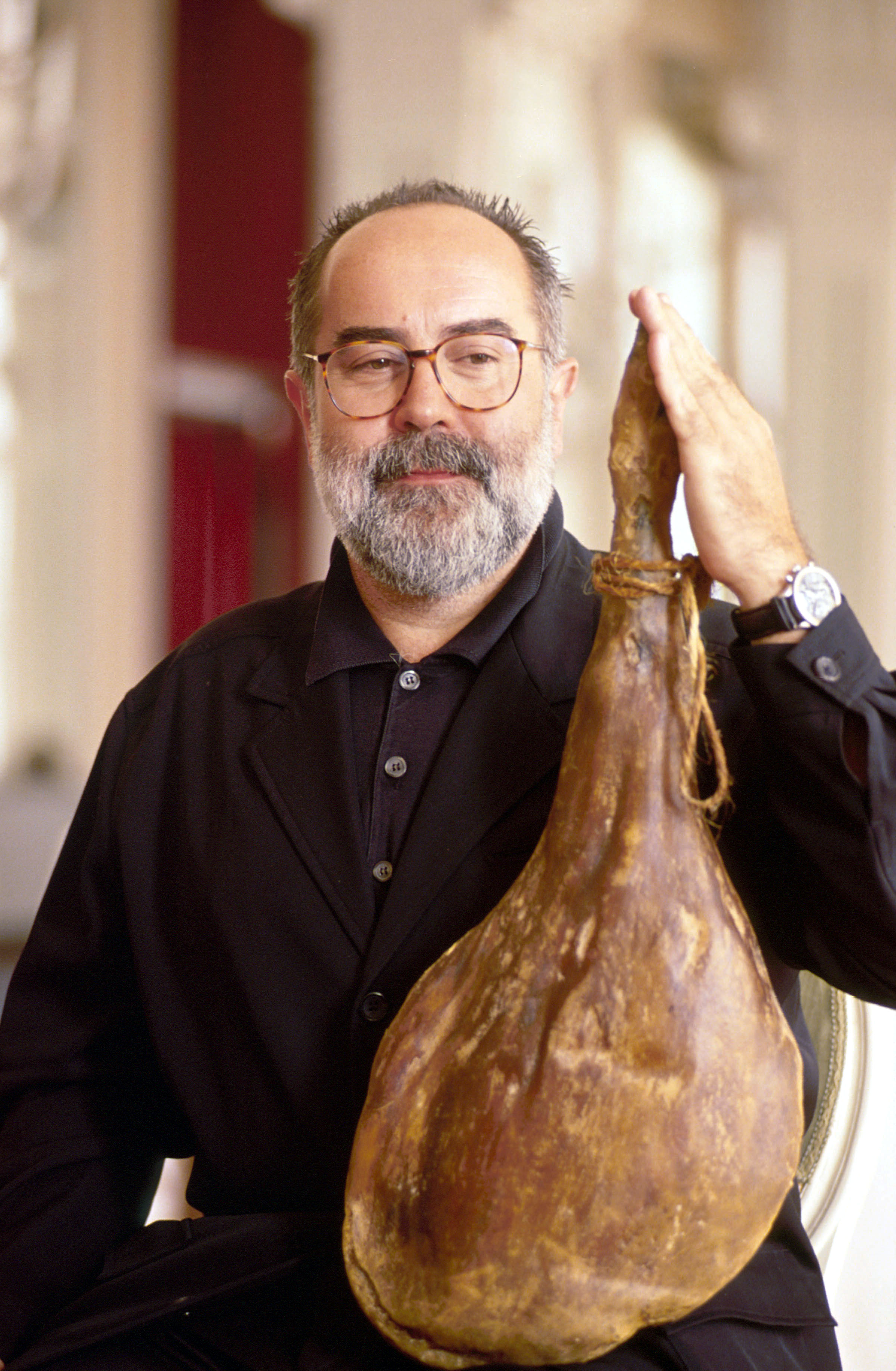 Il regista e sceneggiatore spagnolo Bigas Luna alla Mostra del cinema di Venezia del 1992 per presentare il suo film Prosciutto prosciutto (Jamon, Jamon).